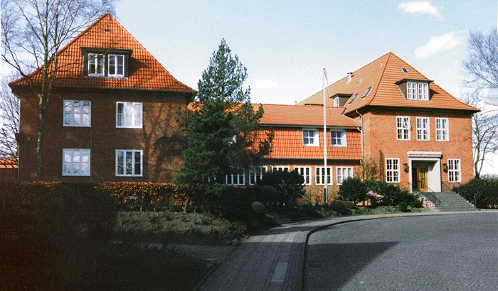 Gustav Johannsen-Schule, Flensburg